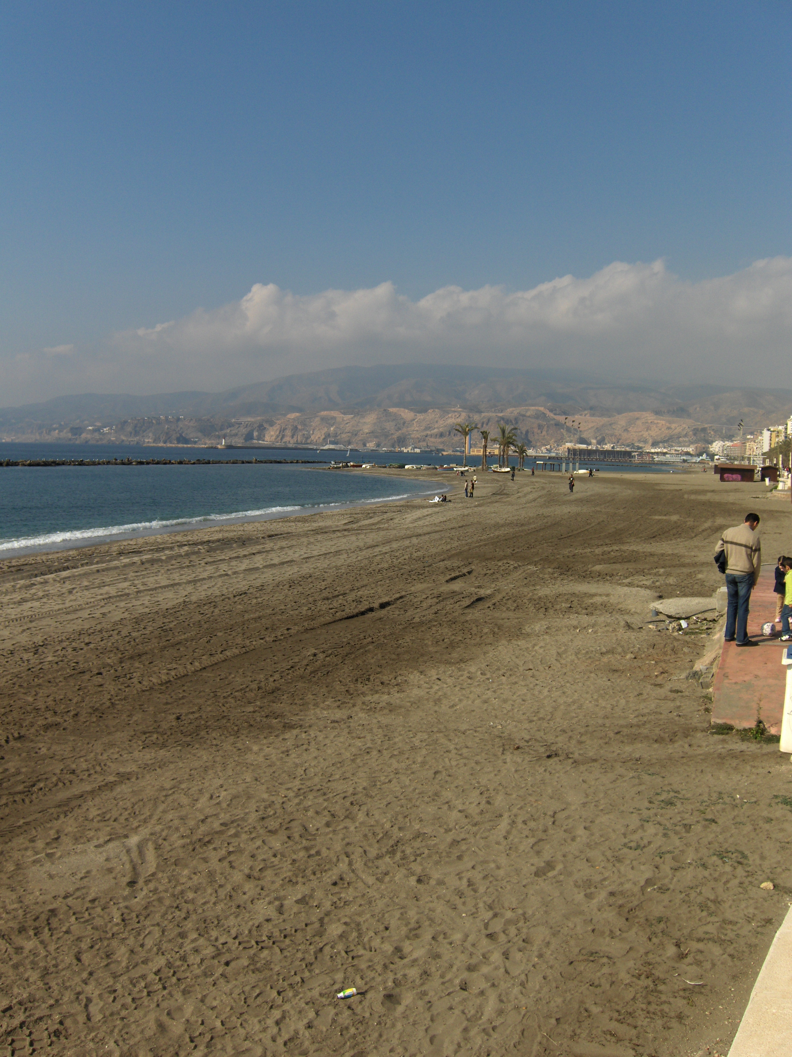 Playa de el Zapillo, Almería (España)